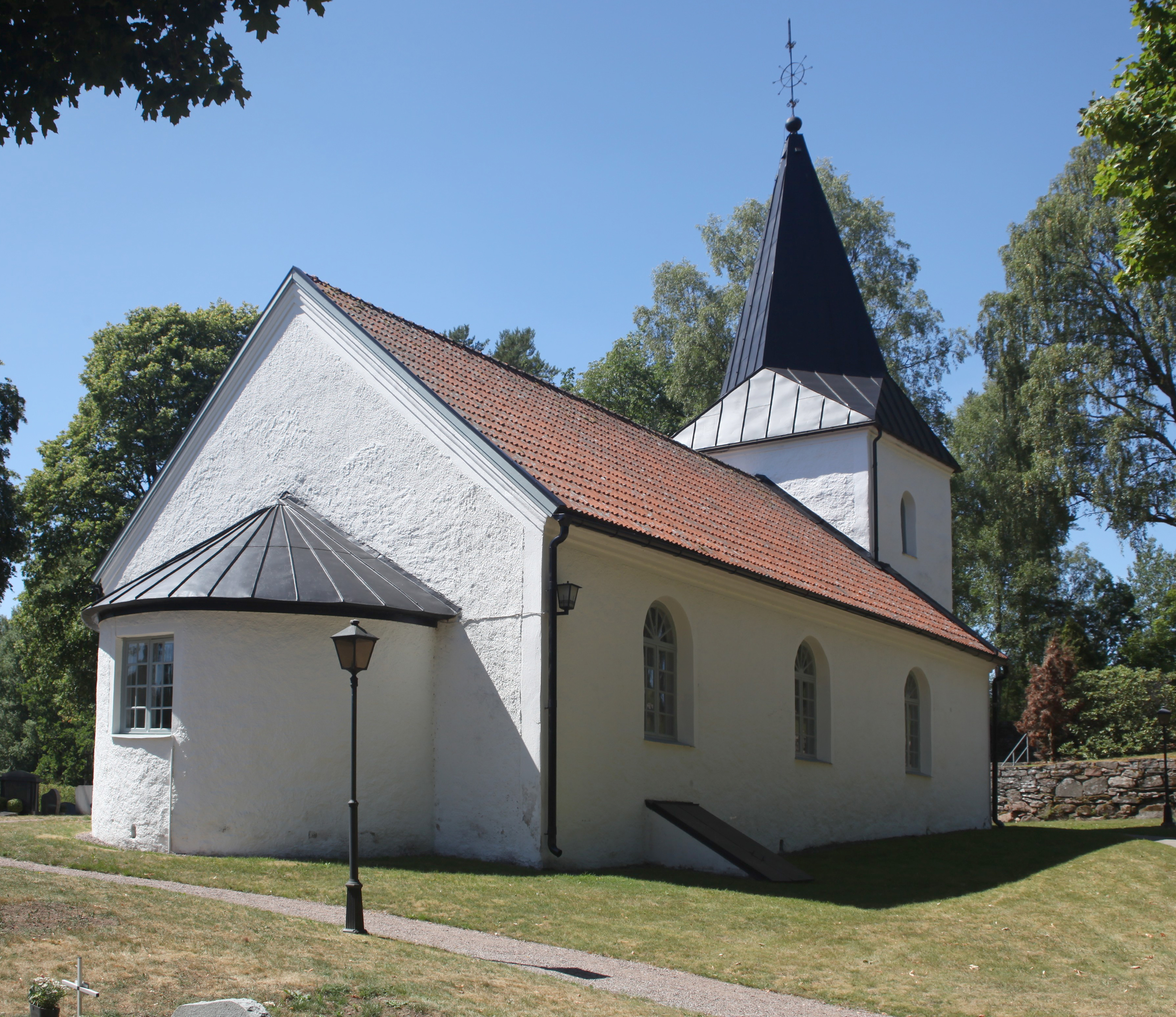 Hulareds kyrka